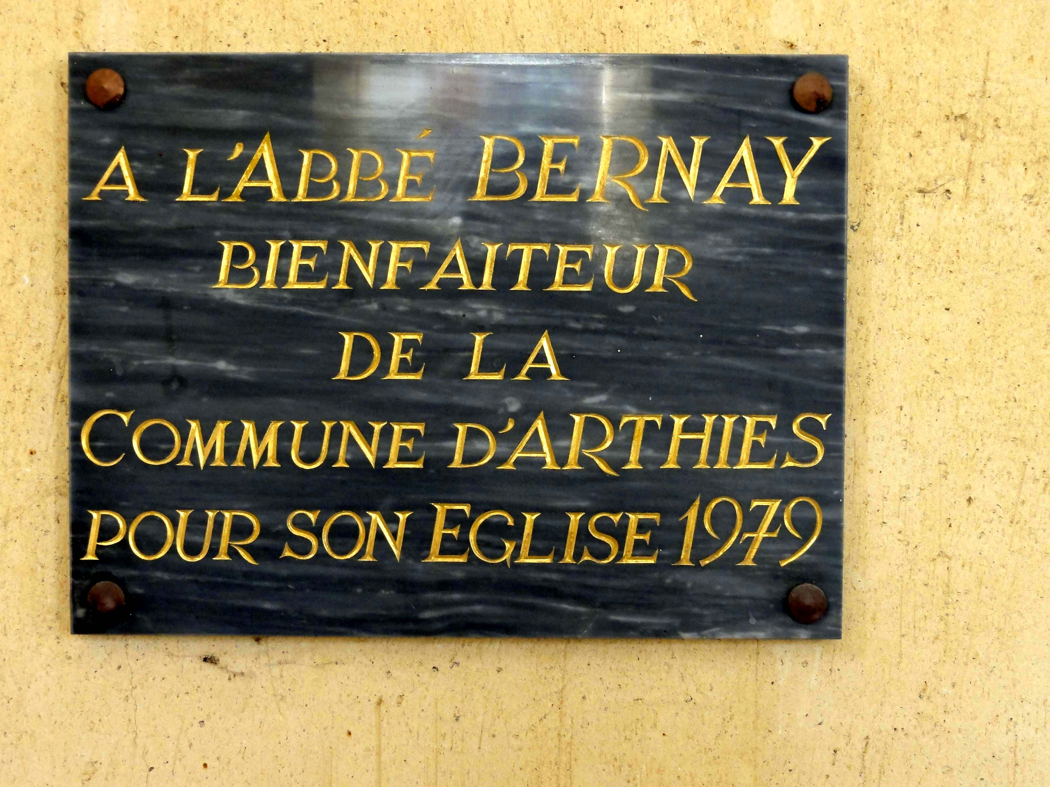 Mobilier de l'église (voir titre).